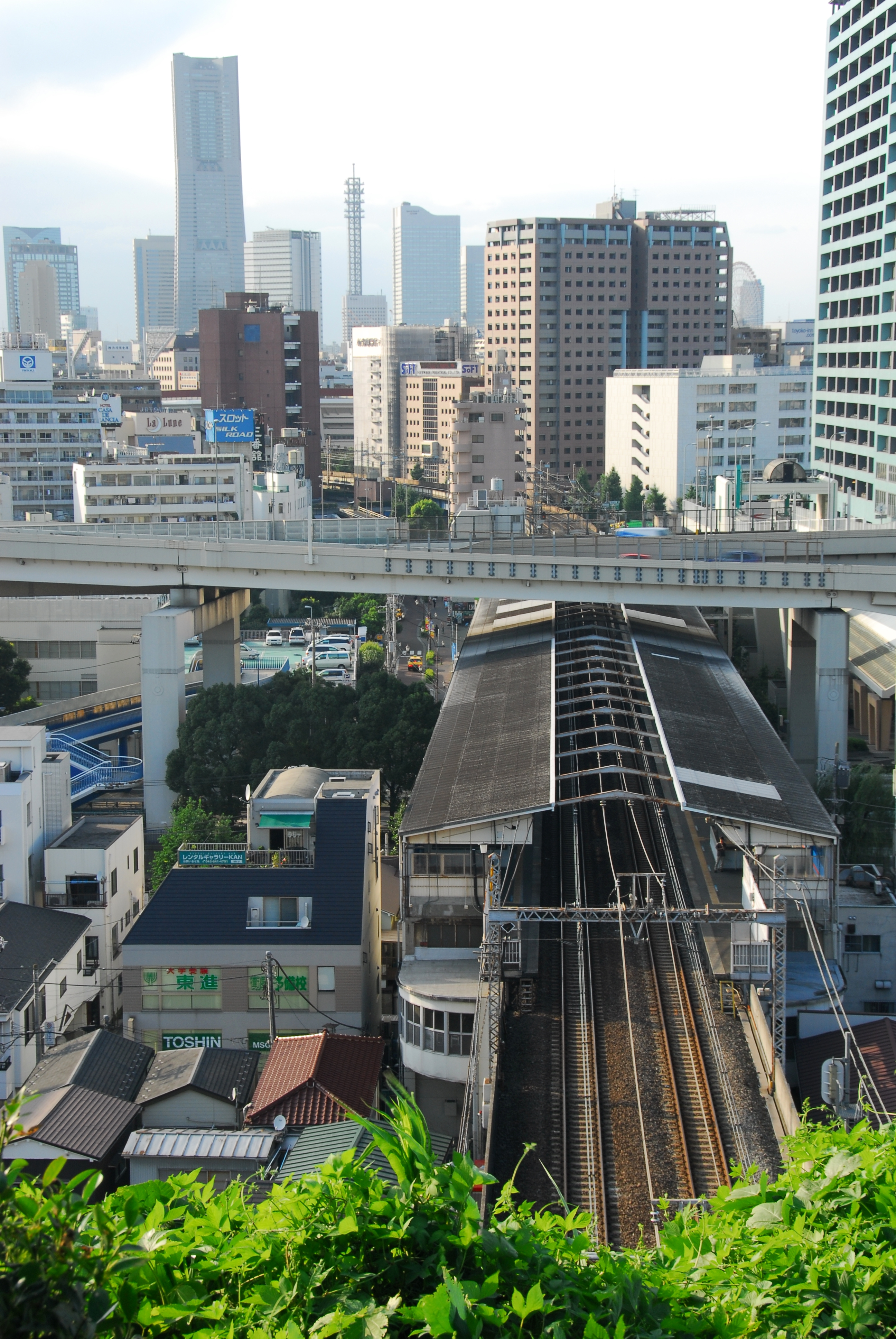 Ishikawacho Station in Yokohama, Japan